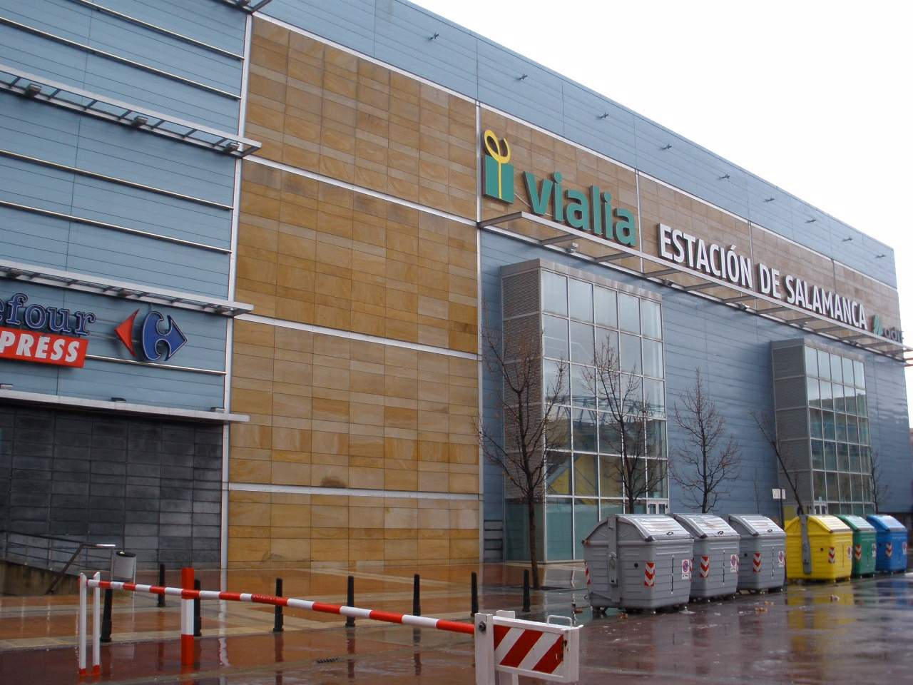 Estación de tren de Salamanca.